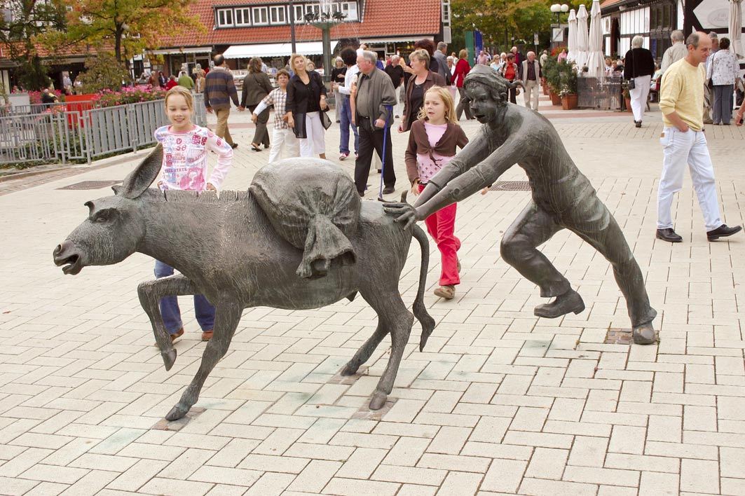 Bad Sassendorf, Esel mit Salzsack - Wahrzeichen der Gemeinde